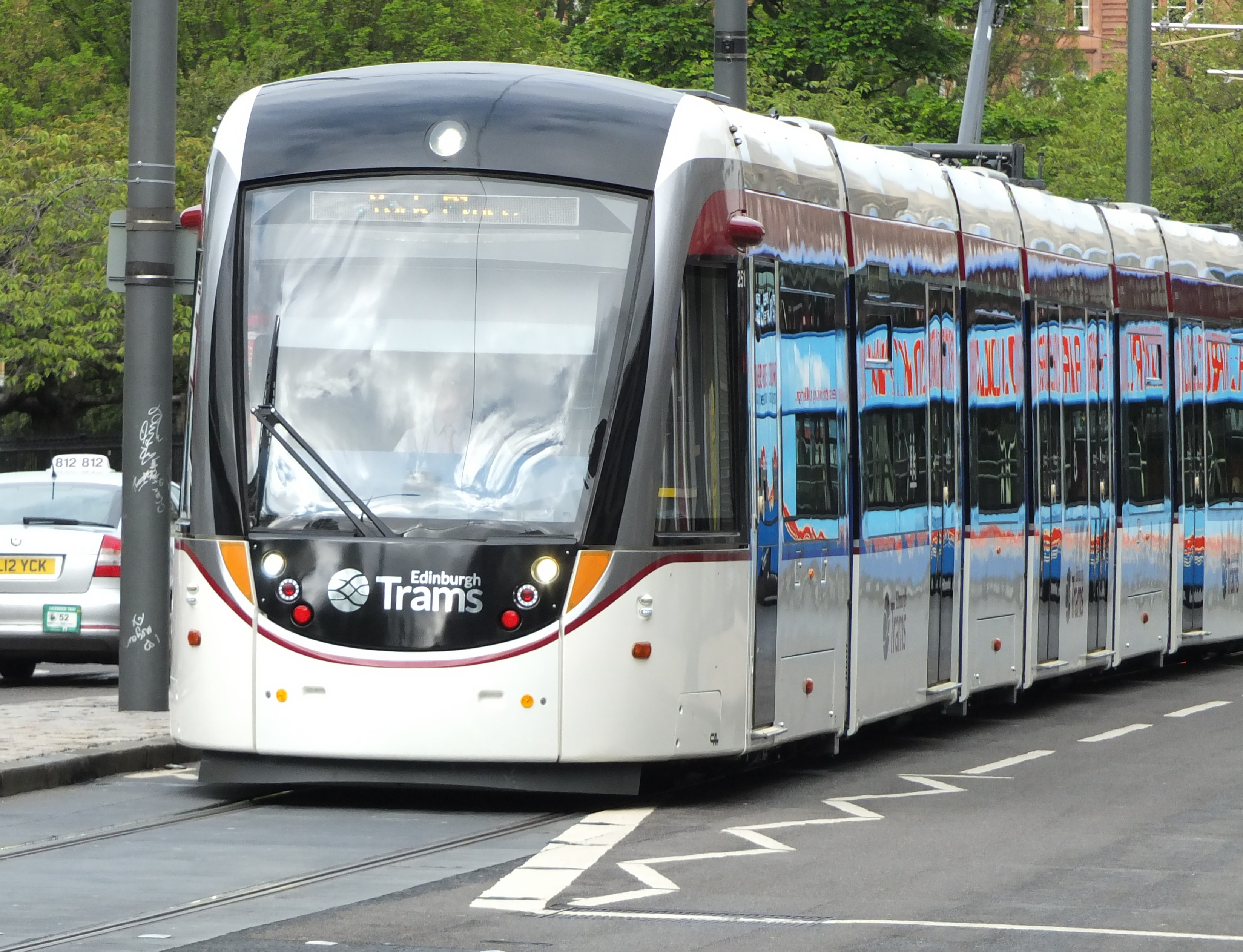 Edinburgh tram in Princes Street.